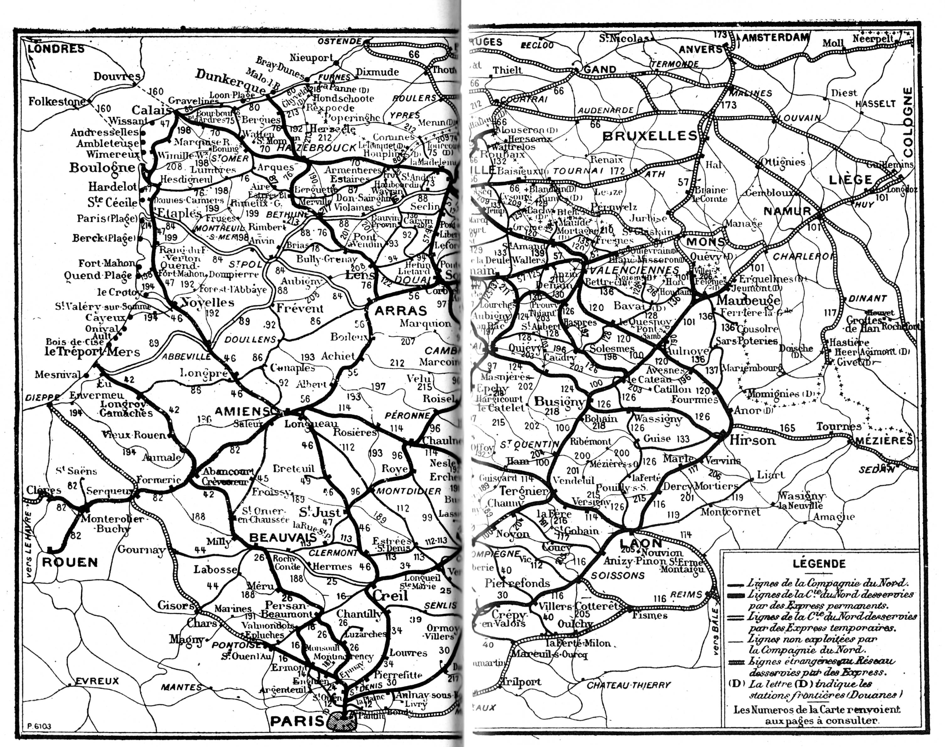 Plan du réseau de la Compagnie du Nord en mai 1914 (extrait du livret Chaix mai 1914)